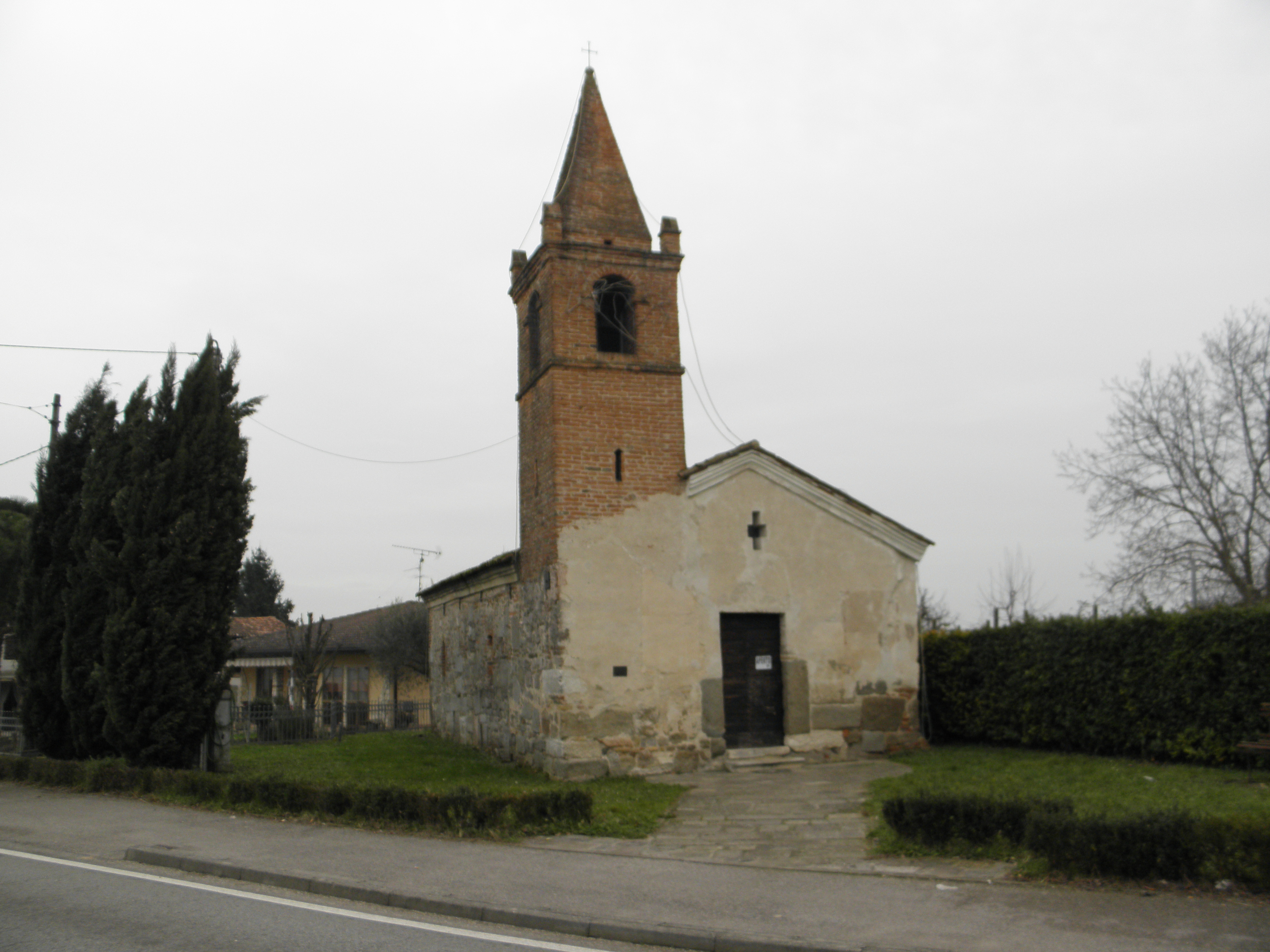 Saletto, la chiesa romanica di San Silvestro (X-XI secolo).